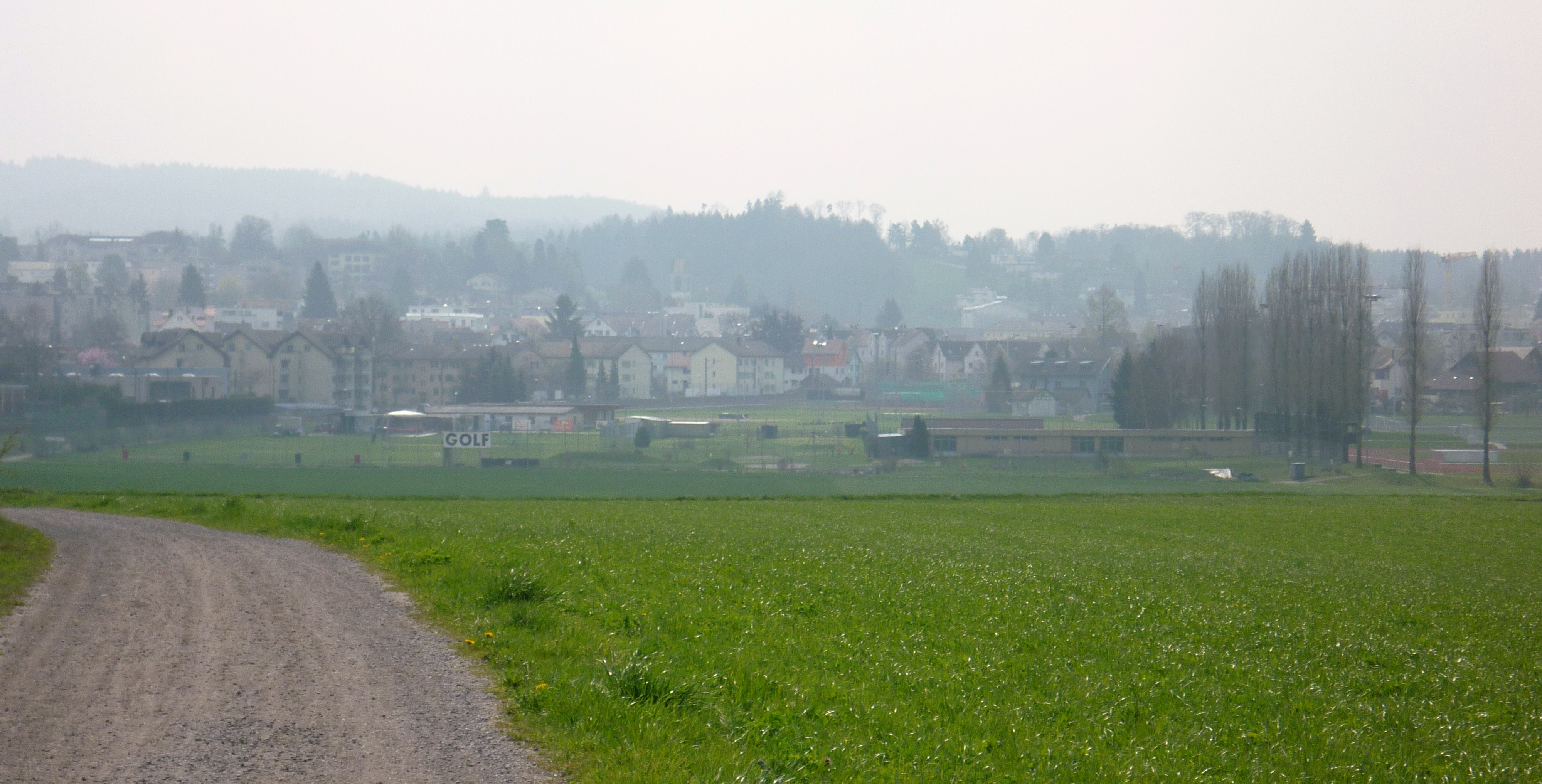 Affoltern am Albis von Hedingen aus gesehen